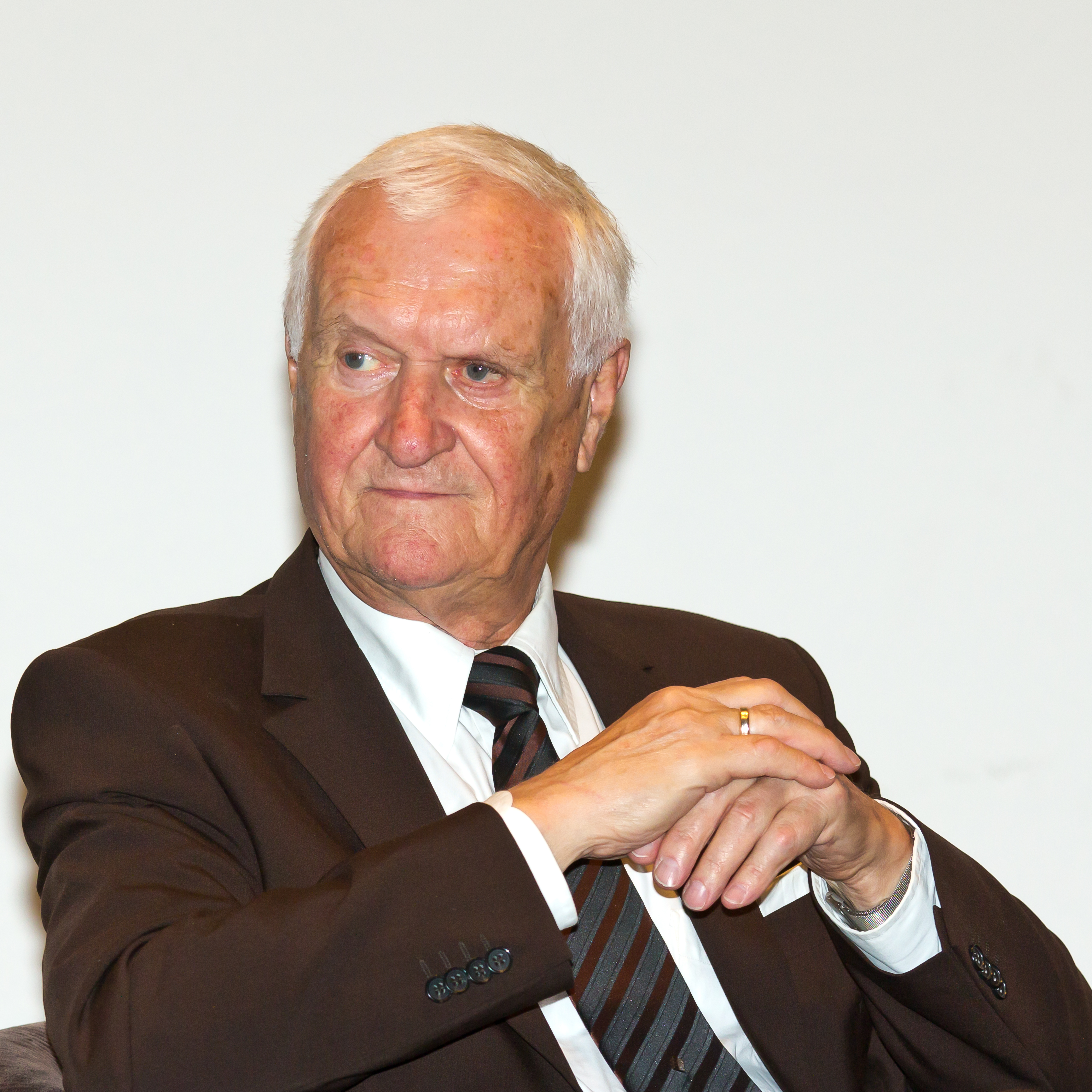 Diskussionsveranstaltung „Deutschlands Rolle in den Vereinten Nationen - eine Bilanz“ im Kölner Rathaus Foto: Karl Theodor Paschke, Botschafter a.D., Untergeneralsekretär der Vereinten Nationen (1994-1999)